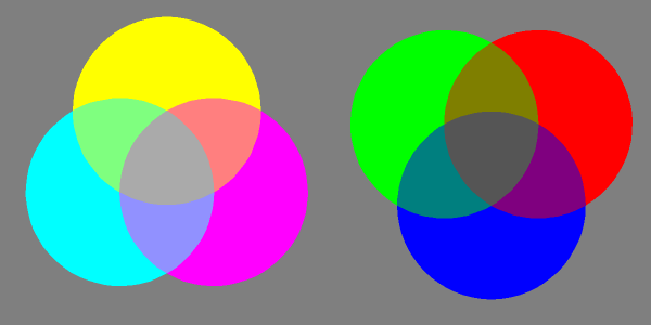 partitive colour mixing